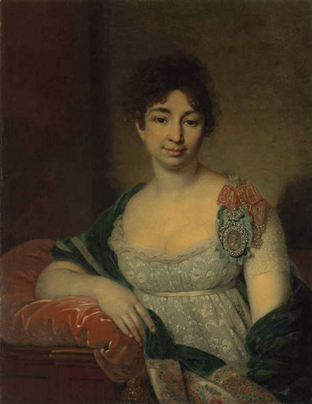 Лопухина Екатерина Николаевна, урождённая Шетнева (1763—1839)